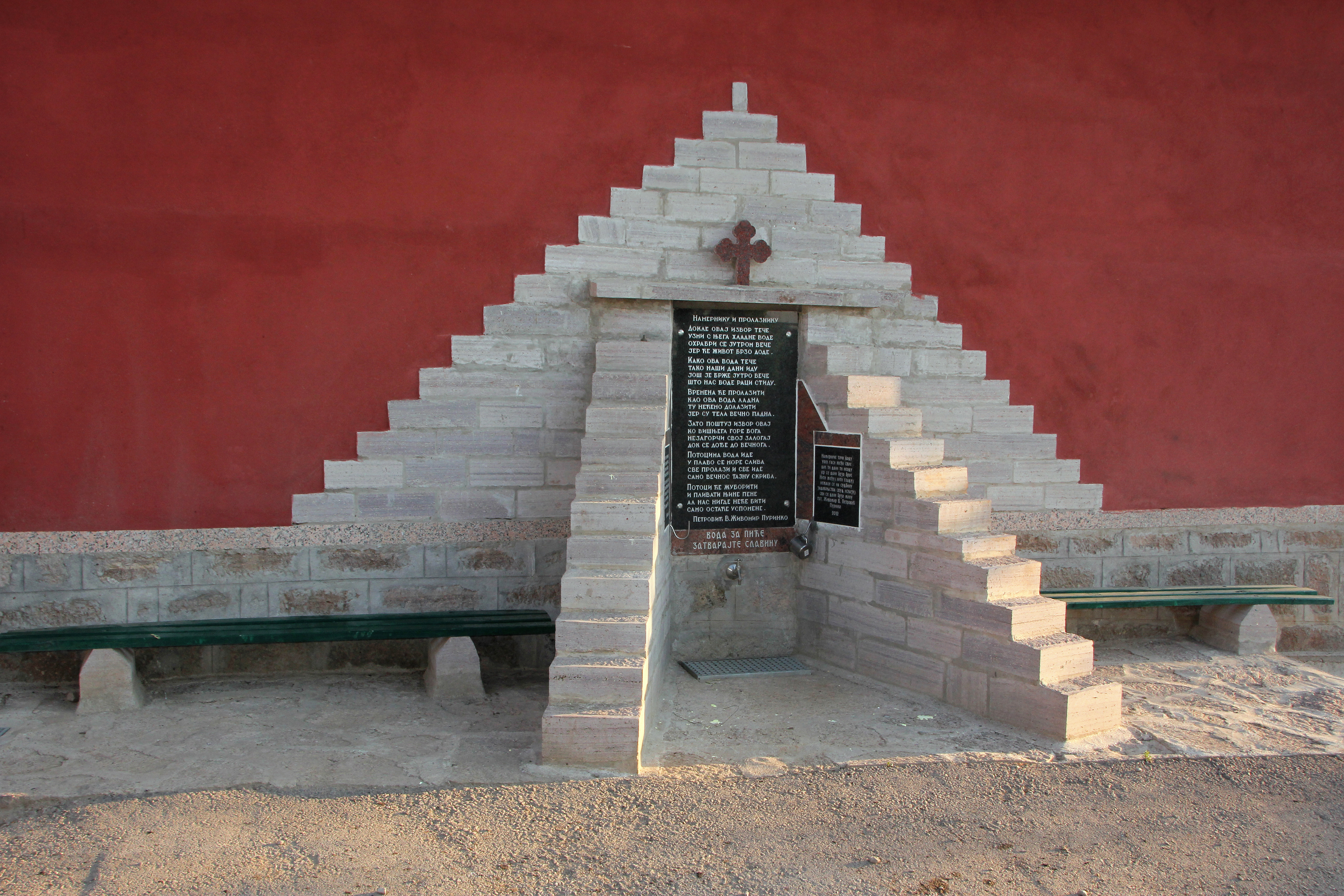 Donja Vrbava kod Gornjeg Milanovca, spomen-česma